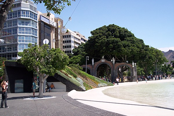 La Alameda del Duque de Santa Elena tras la remodelación de la entrada a la Plaza de España, en Santa Cruz de Tenerife (Tenerife, España).